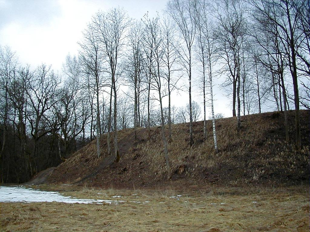 Satezeles pilskalns Siguldā 2001-03-17